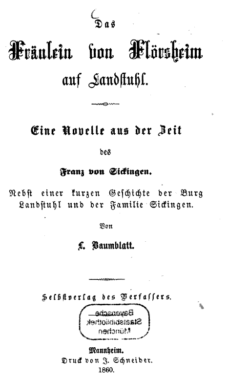 Buchtitel von Luitpold Baumblatt